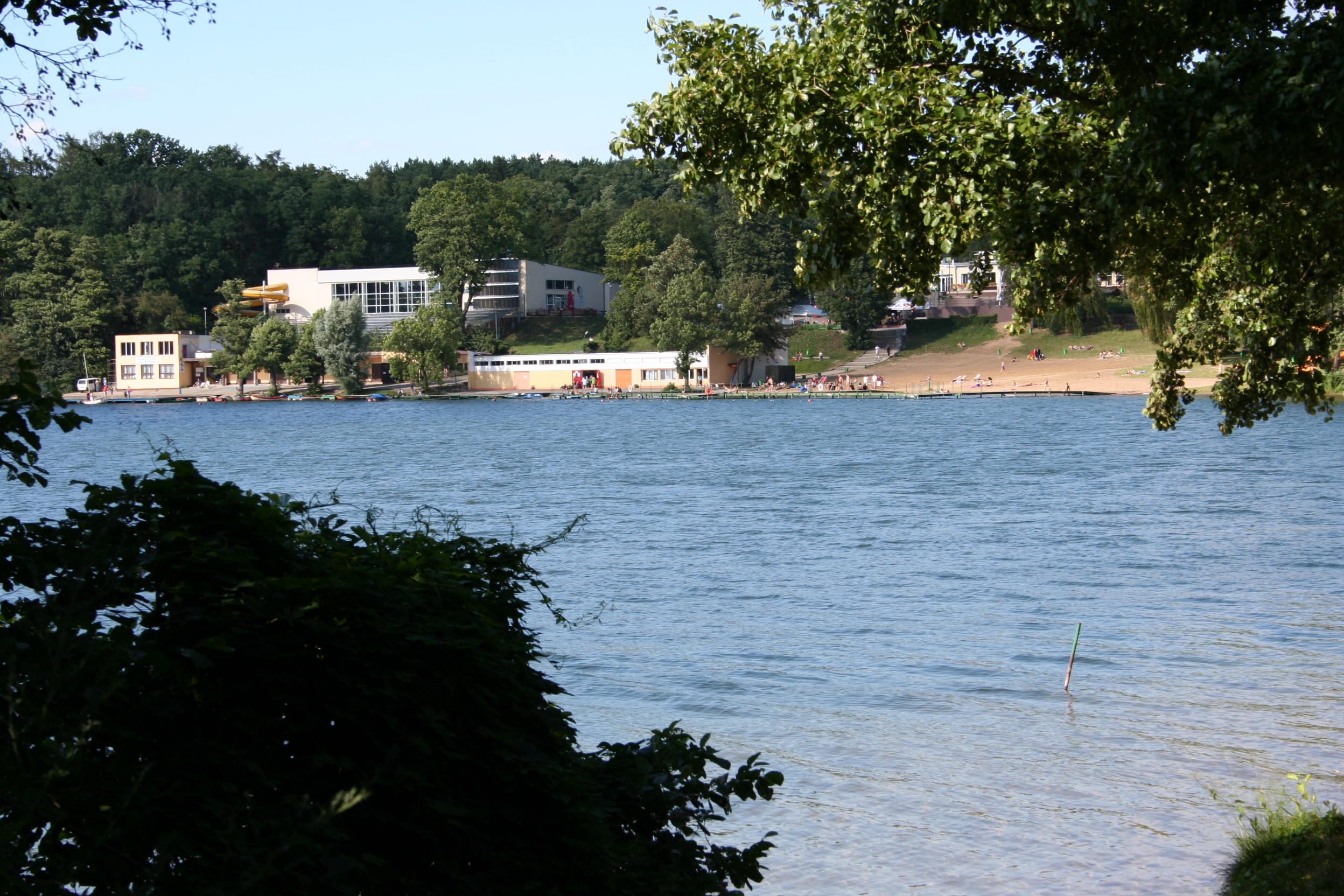 Lato 2007 nad Jez. Jaroszewskim